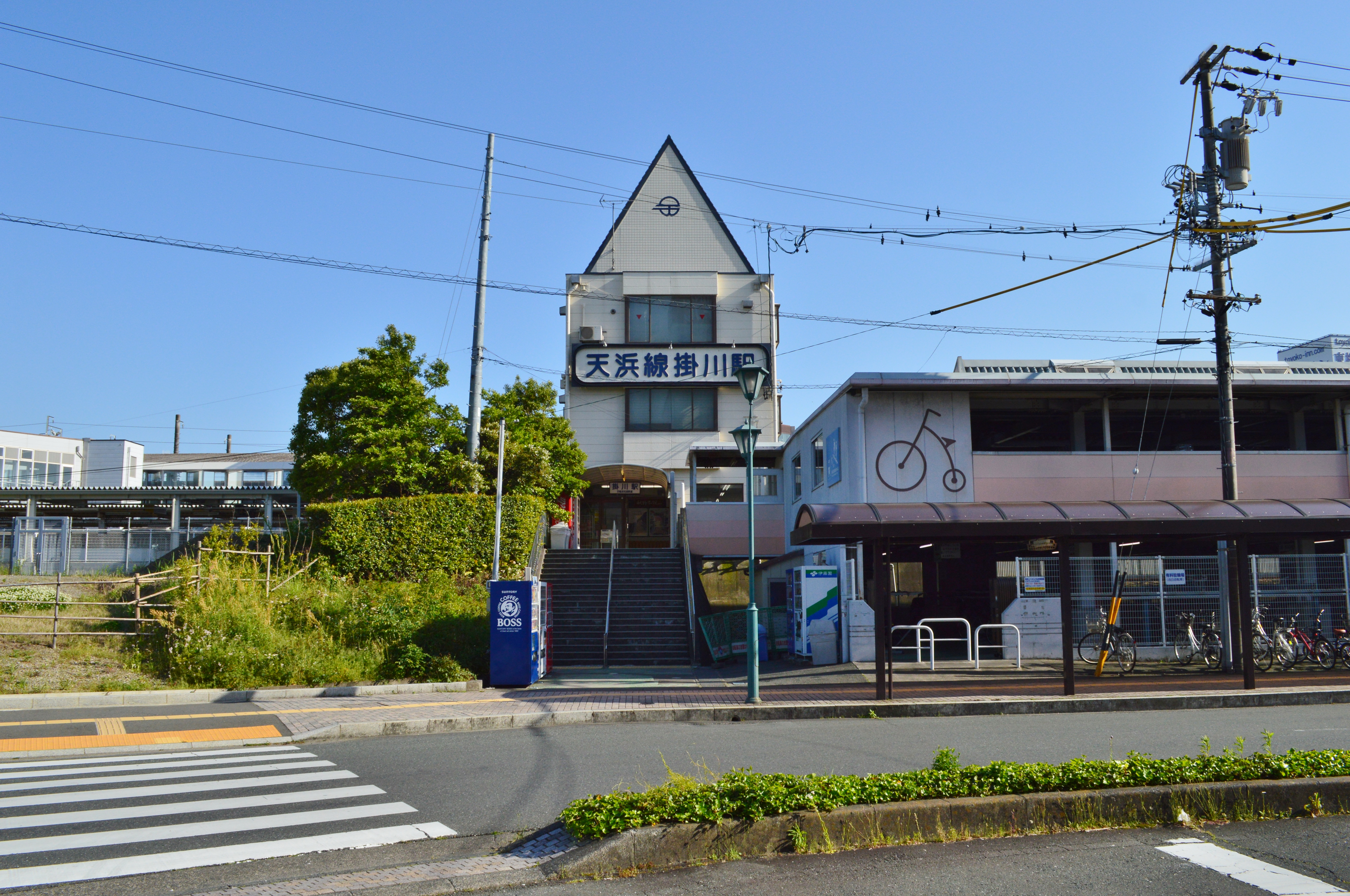 掛川駅 天浜線駅舎